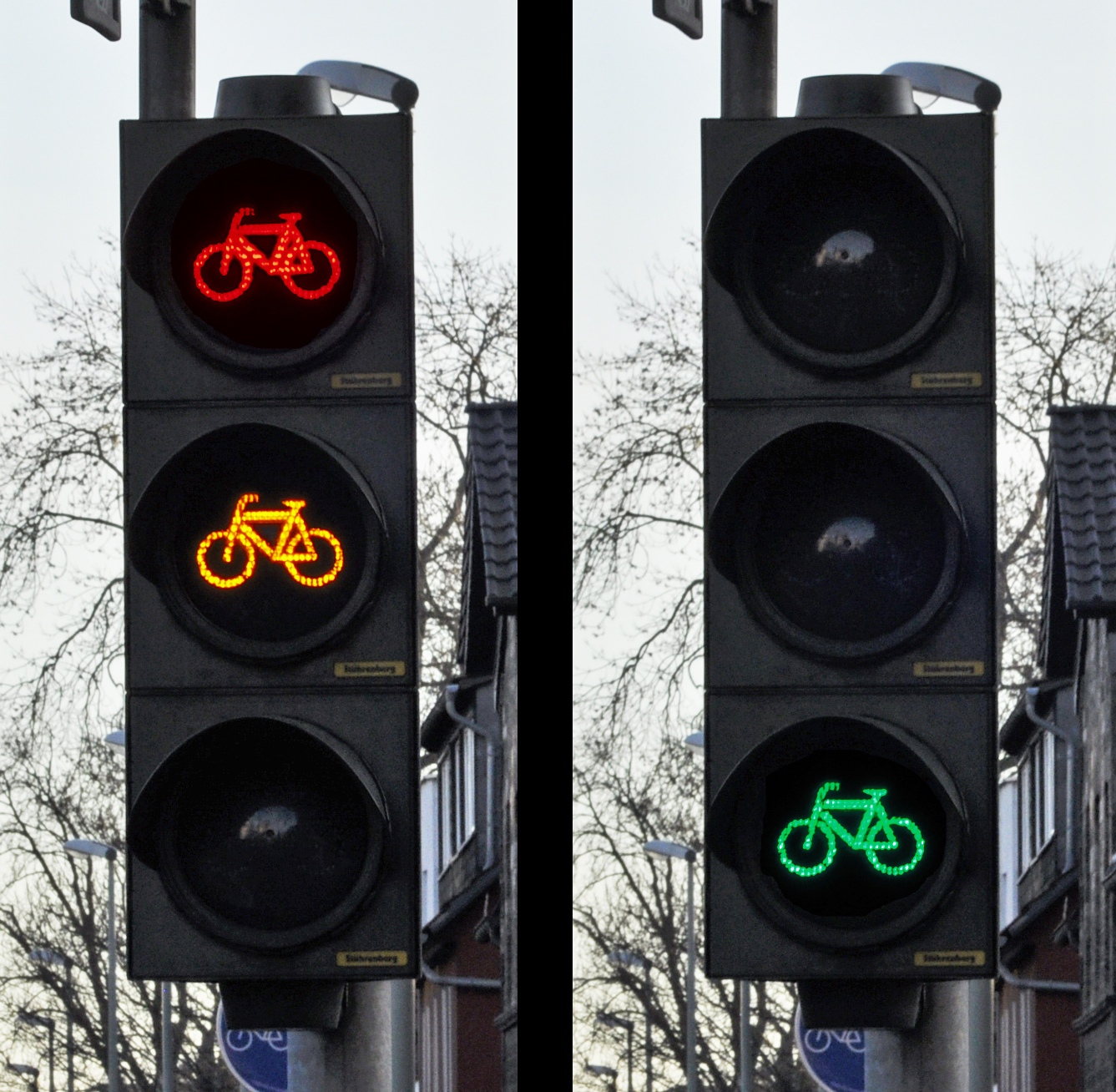 Fahrradampel, Göttingen, Weender Landstraße/Güterbahnhofstraße, 30.12.2013. Fotos: Francisco Welter-Schultes.